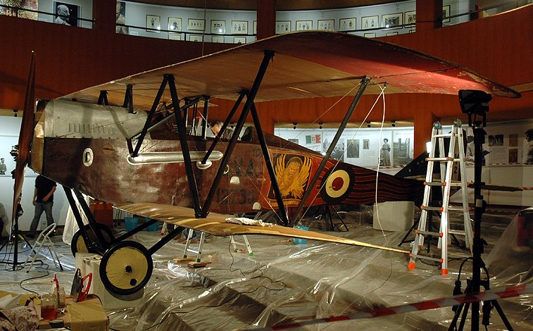 Ansaldo SVA 10 durante l'operazione di restauro al Museo del Vittoriale degli Italiani